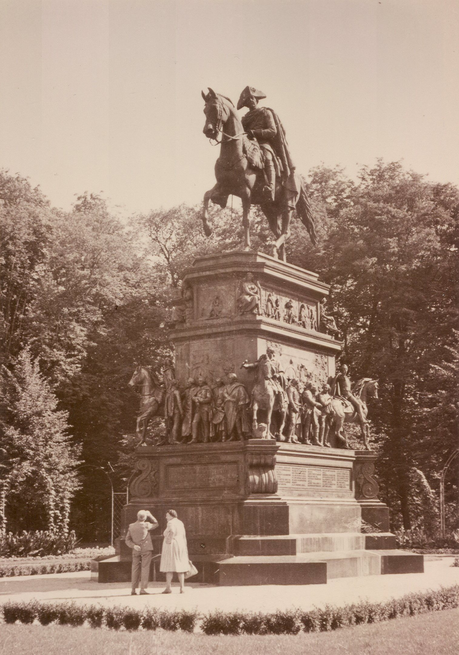 Das Berliner Reiterstandbild im Potsdamer Hippodrom